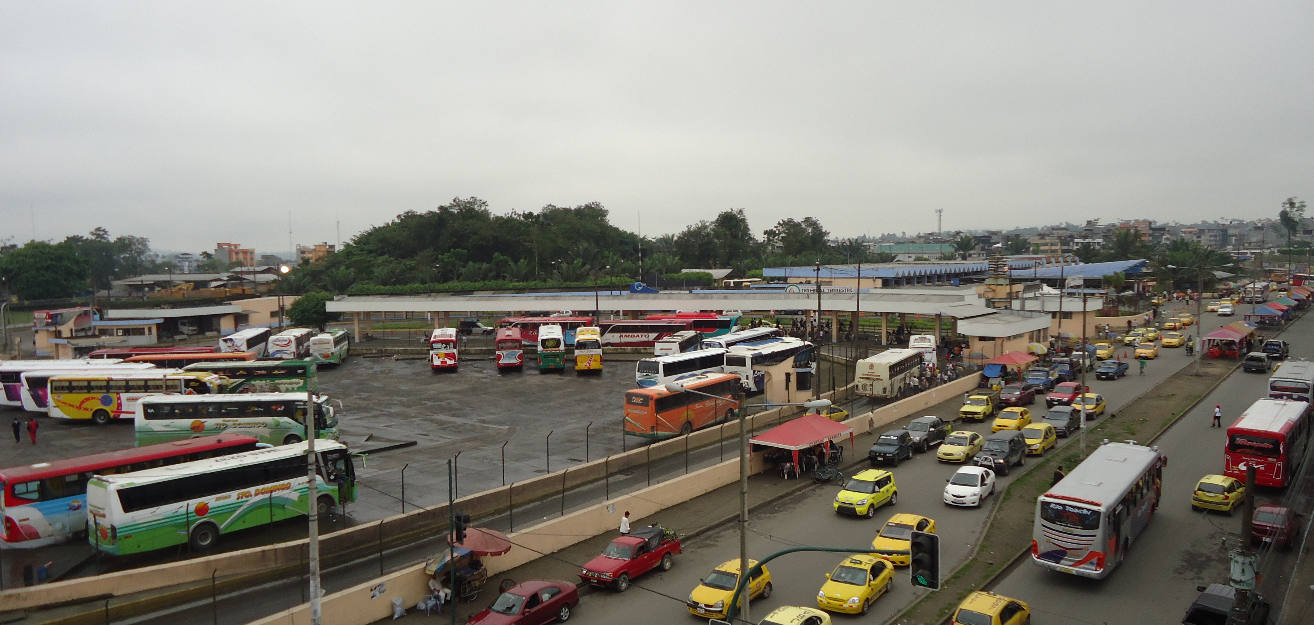 Terminal Terresre de Santo Domingo (Ecuador)